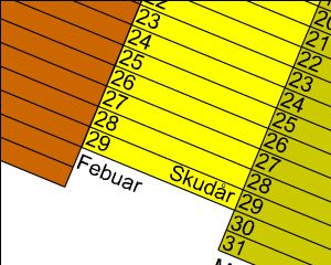 Skudåret er d. 29 Februar hvert 4. år